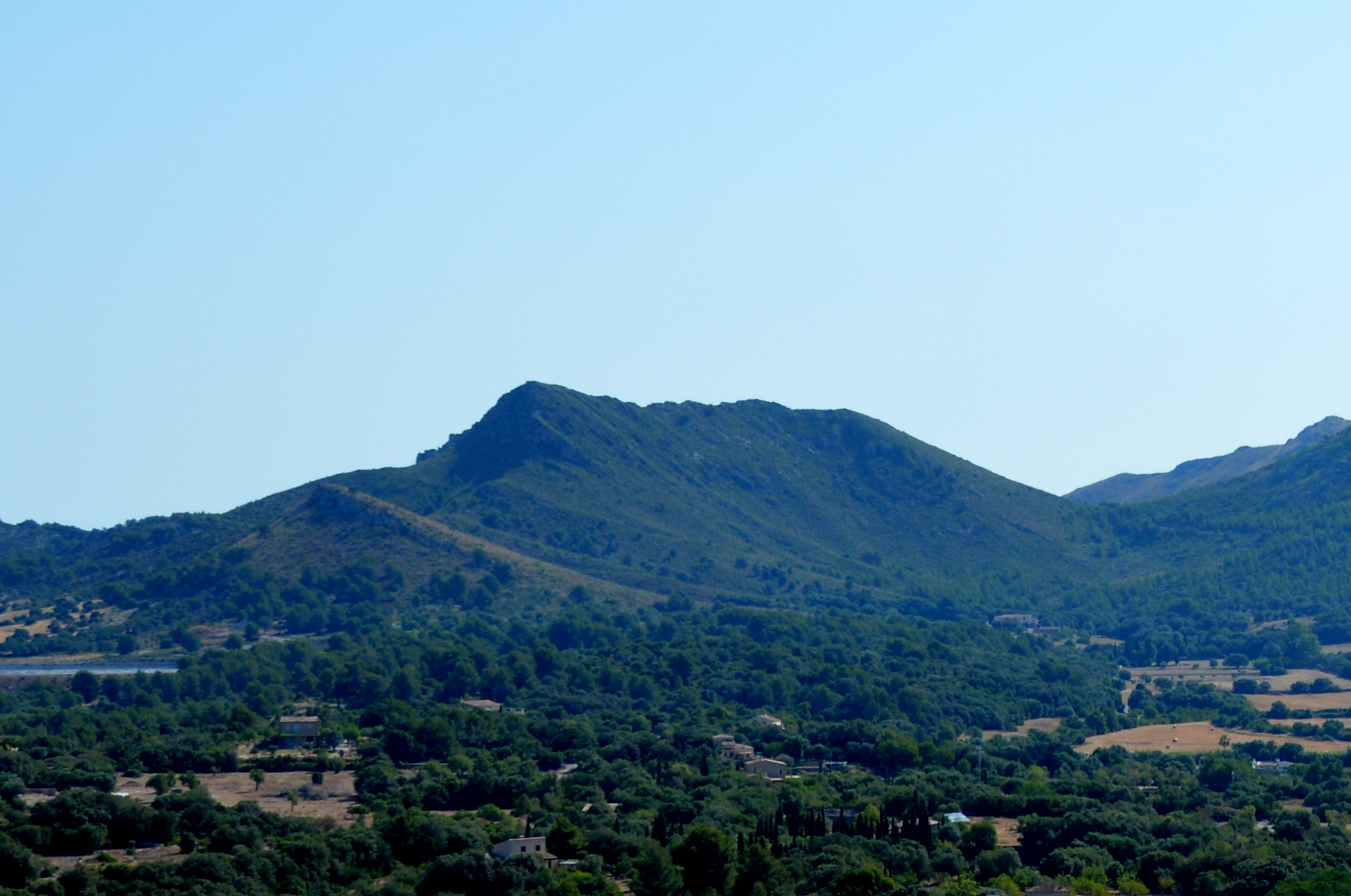 Puig d en Pocason